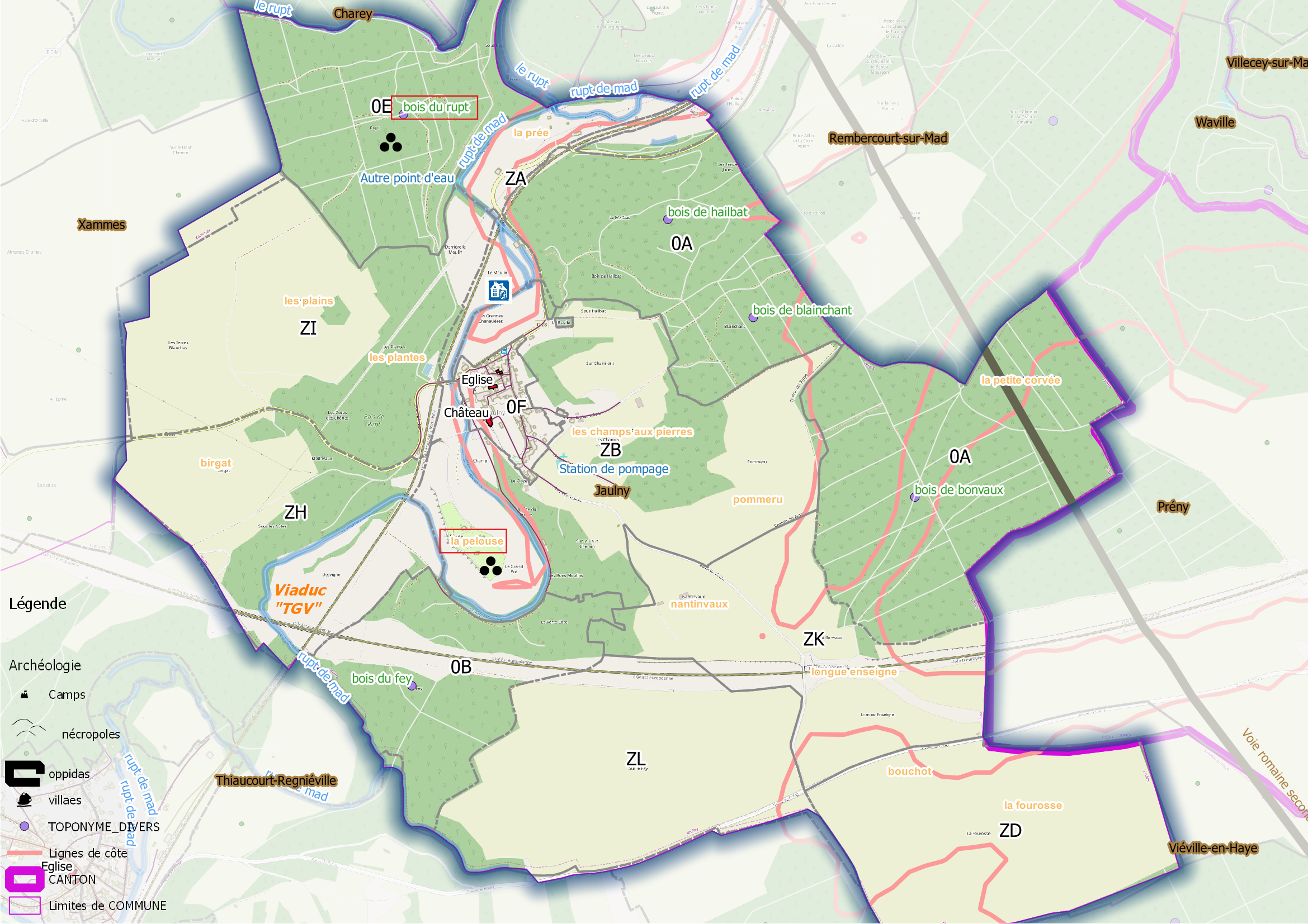 Jaulny (ban communal) OSM et Qgis, mentions additionnelles.